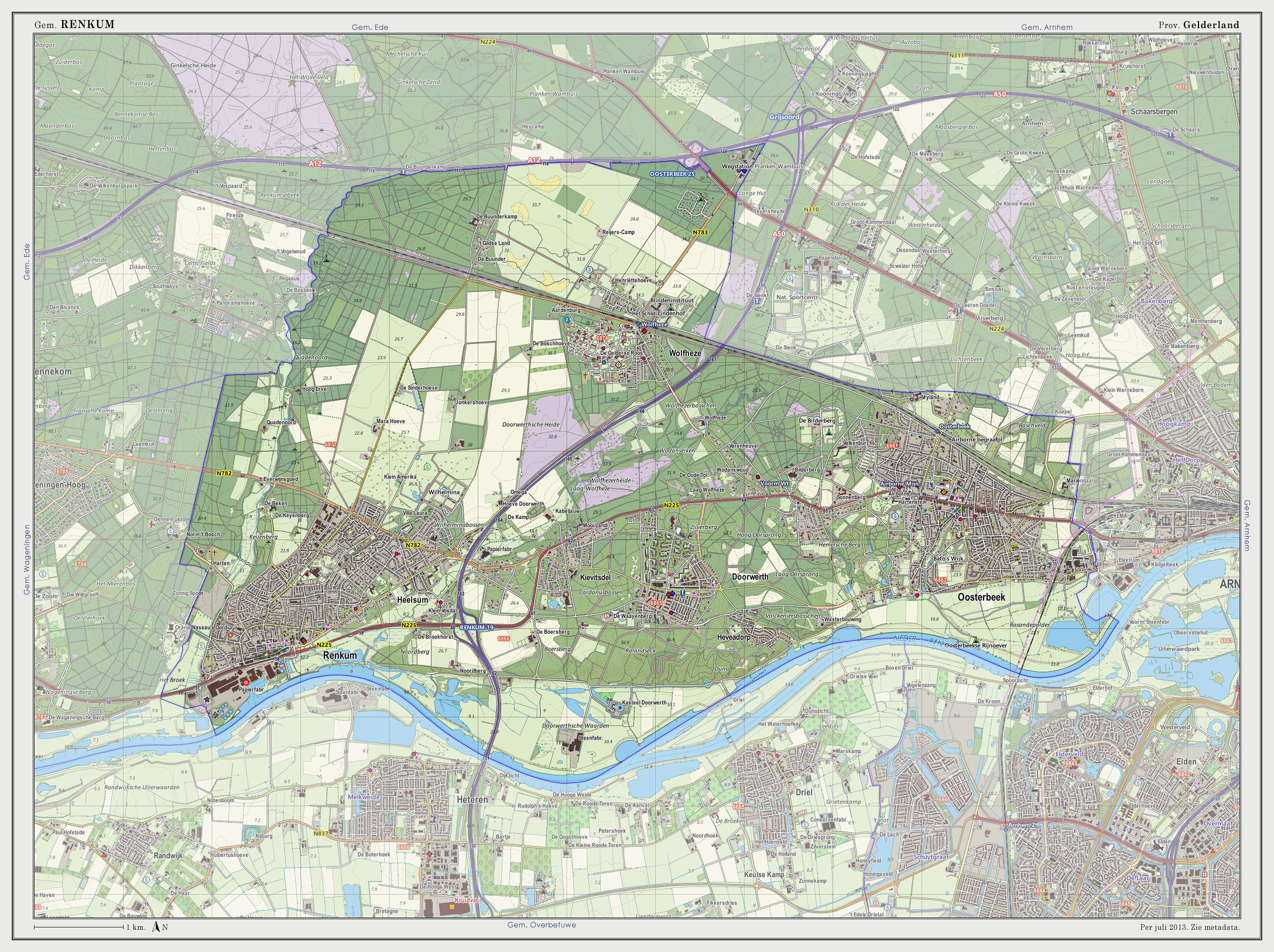 Topografische kaart van gemeente Renkum (2013). Samengesteld door Jan-Willem van Aalst op basis van de GML open geodata van de BRT/Top10NL (basisregistratie Topografie, Kadaster 2011), vrijgegeven door Kadaster onder de Creative Commons BY licentie. Additionele gegevens uit BAG (8 juli 2013), uit de Open Street Map (9 juli 2013) en uit de Risicokaart. Peildatum kaartbeeld: 9 juli 2013. Zie ook Gemeentenatlas.nl Samenstelling en kleurenschema: Jan-Willem van Aalst, met QuantumGIS en Photoshop. Zie ook de Legenda.